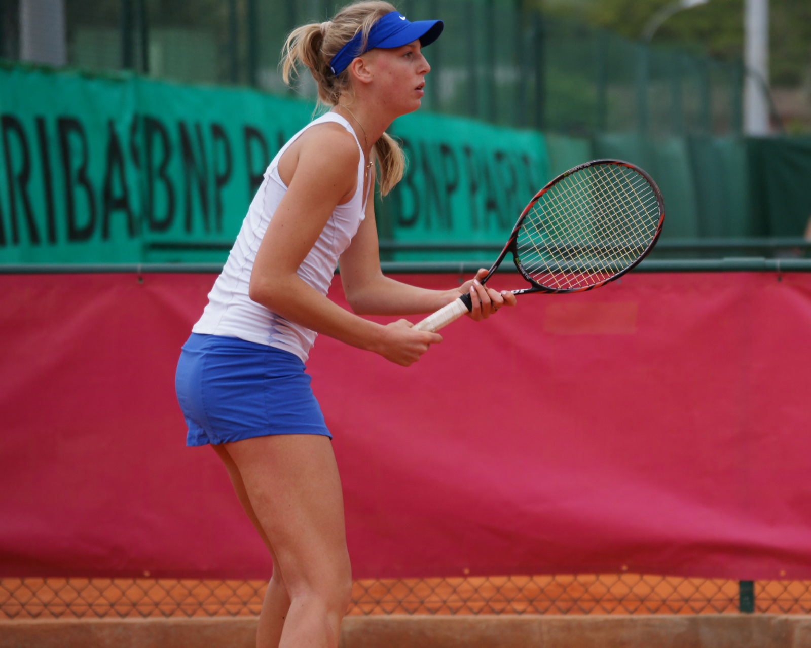 Naomi Broady, Open tennis Cagnes-sur-Mer 2012